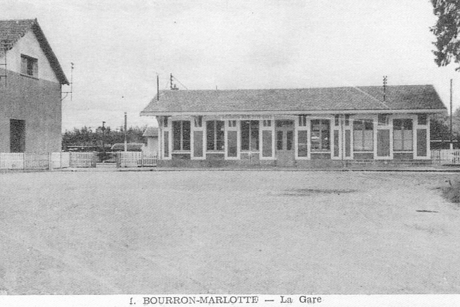 Gare de Bourron-Marlotte (Seine-et-Marne, France), au début du XX° siècle.